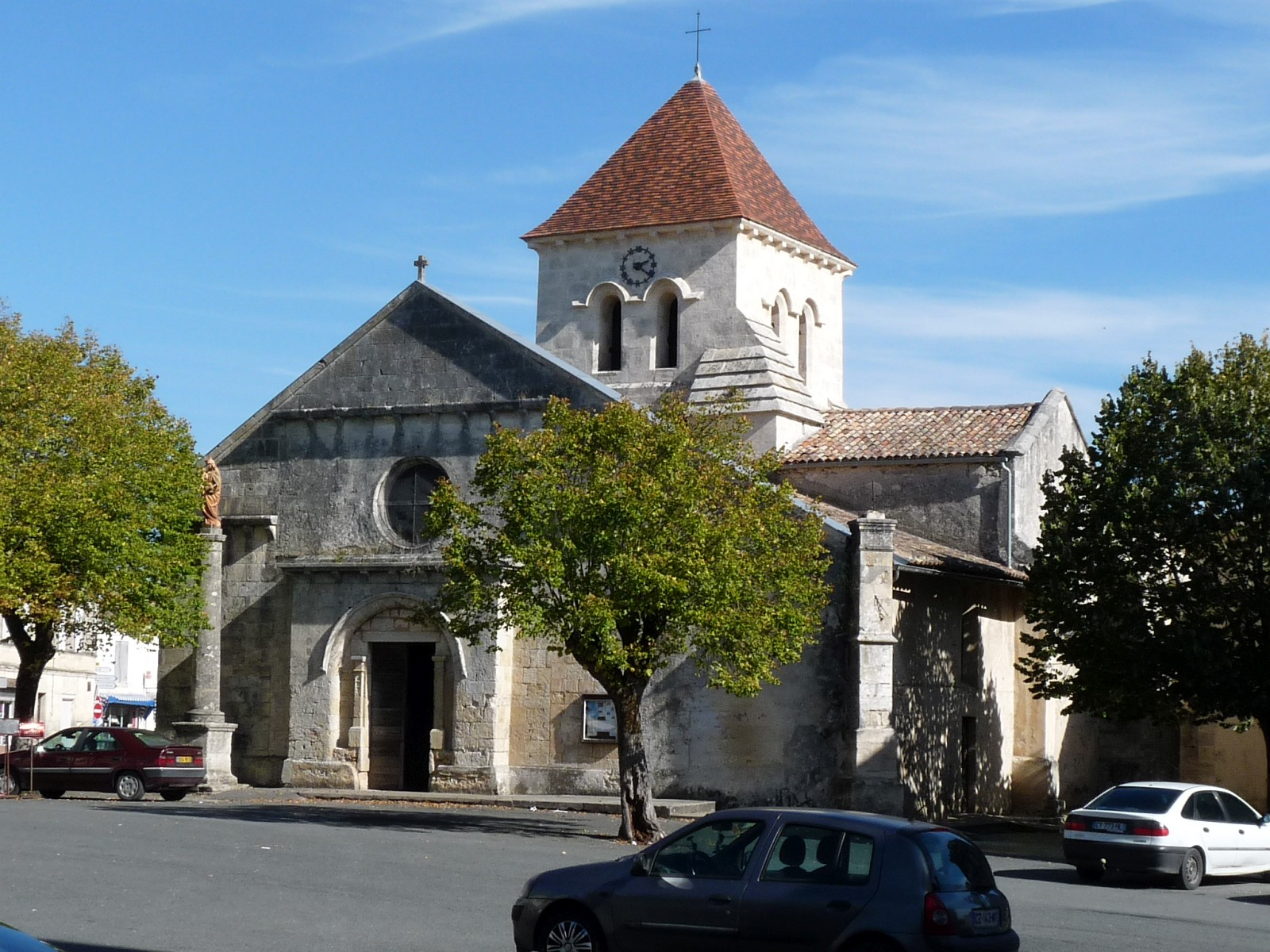 Eglise de Saint-Christoly-de-Blaye, Gironde, France